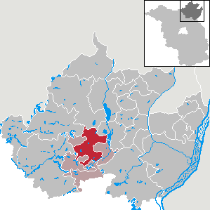 Gerswalde in Brandenburg (Country) - District Uckermark